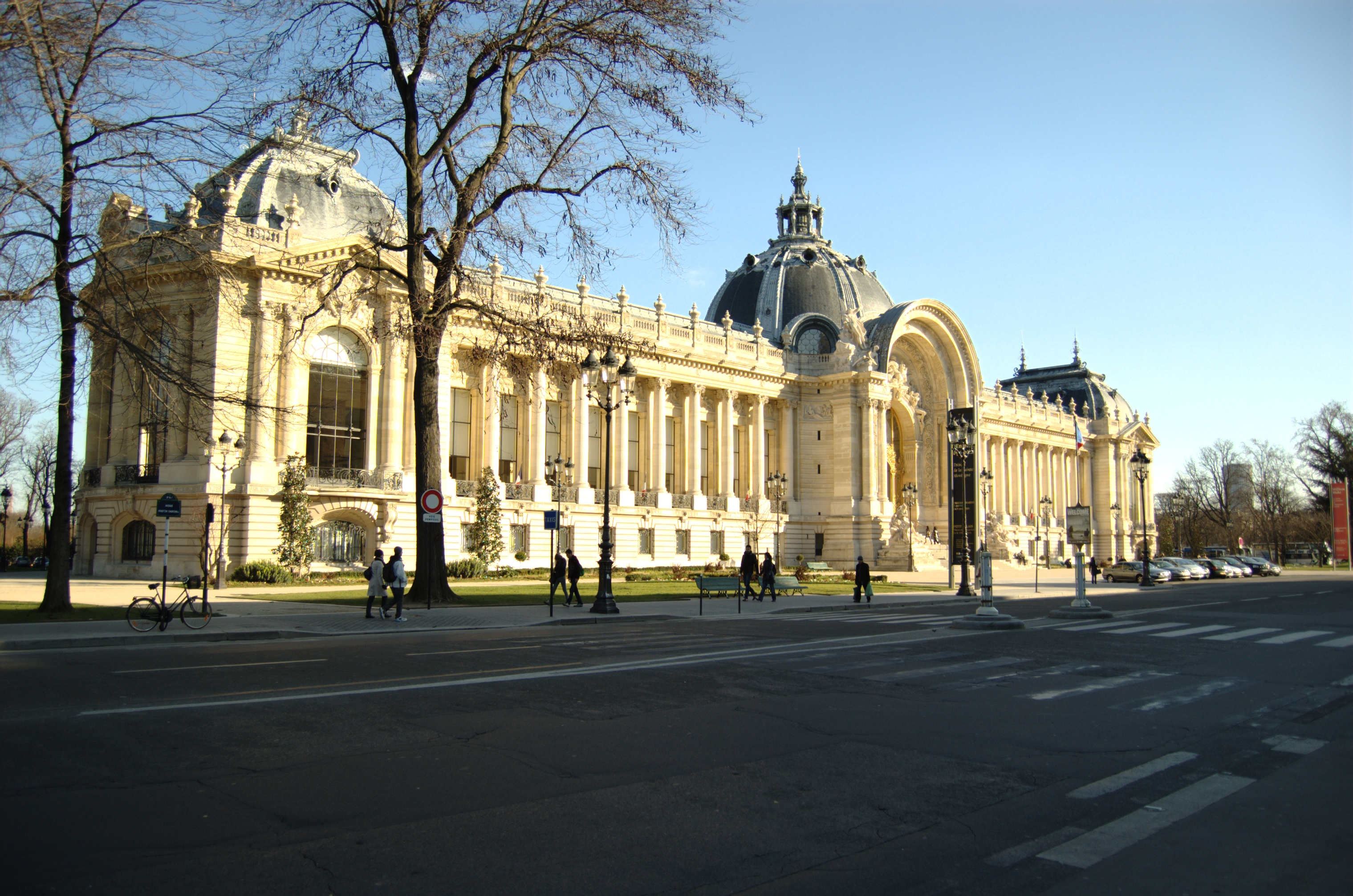 Façade du Petit Palais - Paris. 06 mars 2009